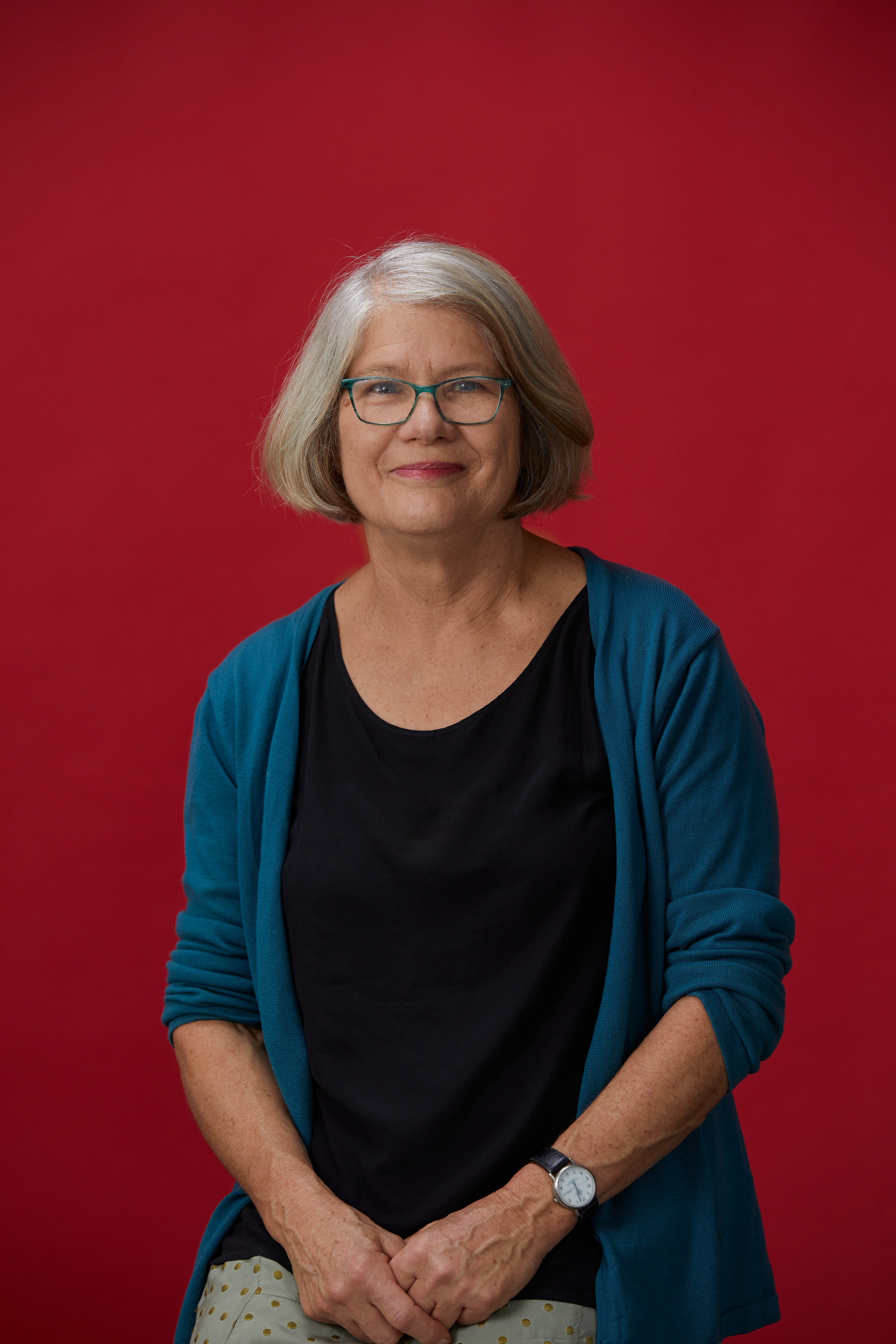 Bettina Bradbury, historienne